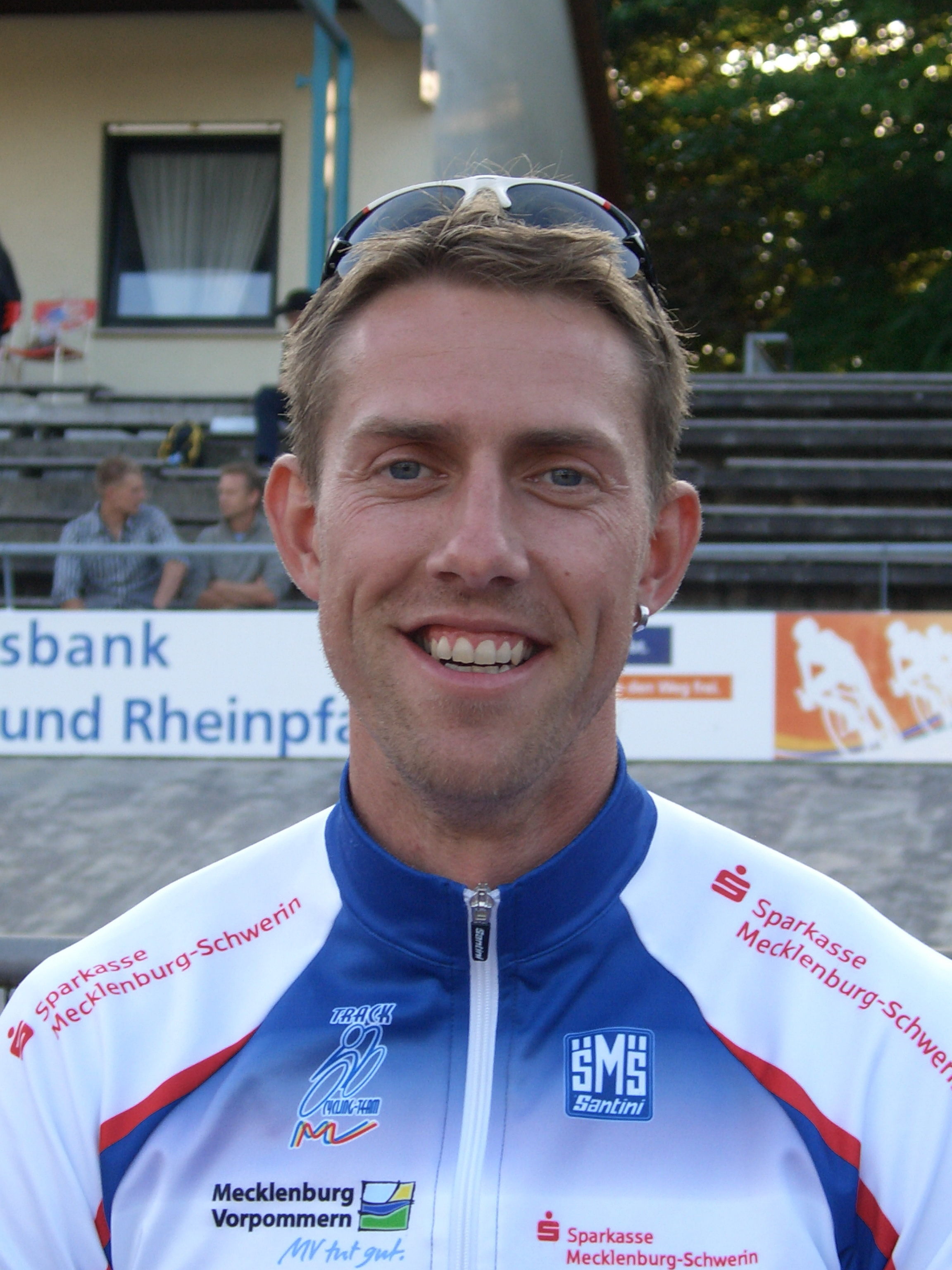 Stefan Nimke, dt. Radsportler